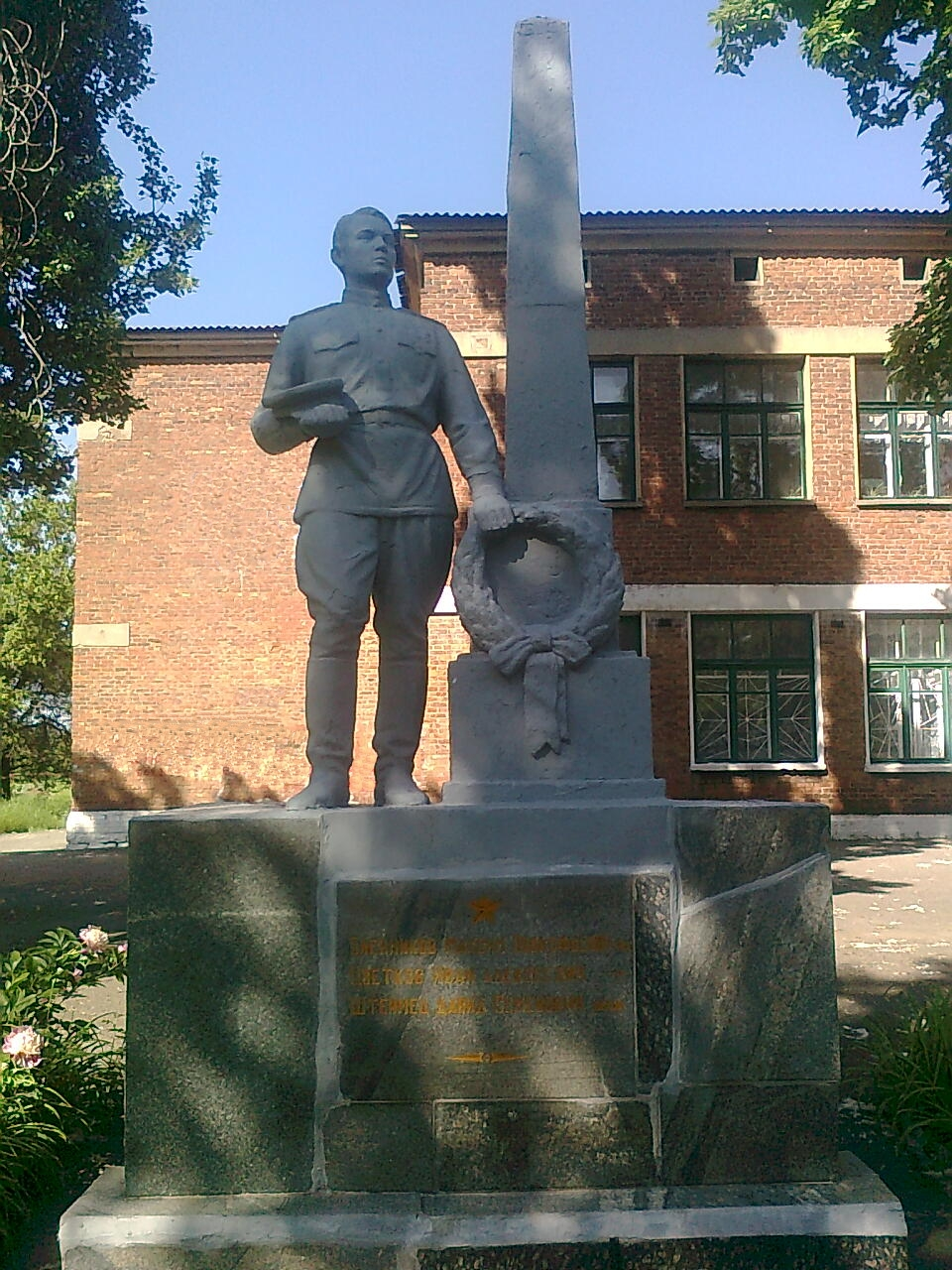 Пам’ятник на братській могилі радянських воїнів, м. Артемове, двір ЗОШ № 13